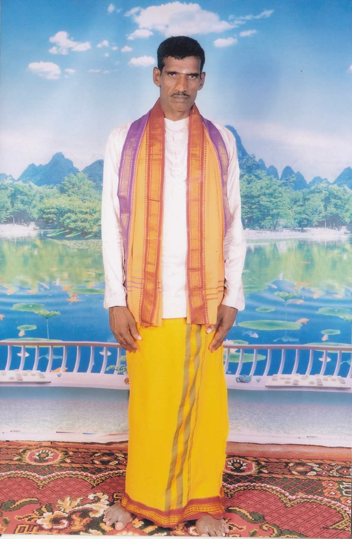 கற்கோவளம் வேணுகானசபா அண்ணாவியார்"வே.நந்தகோபாலன்"